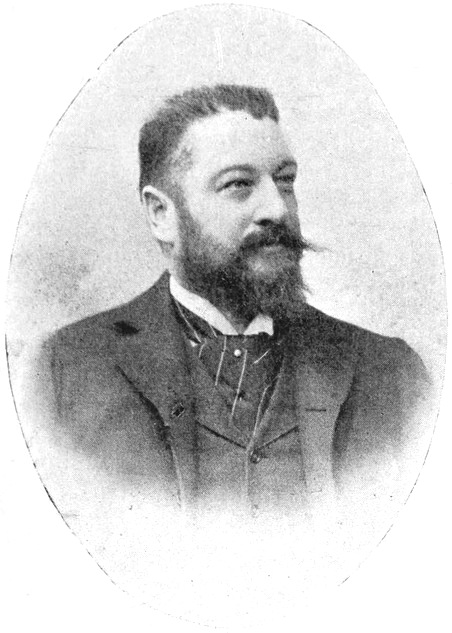 M. Poidatz.